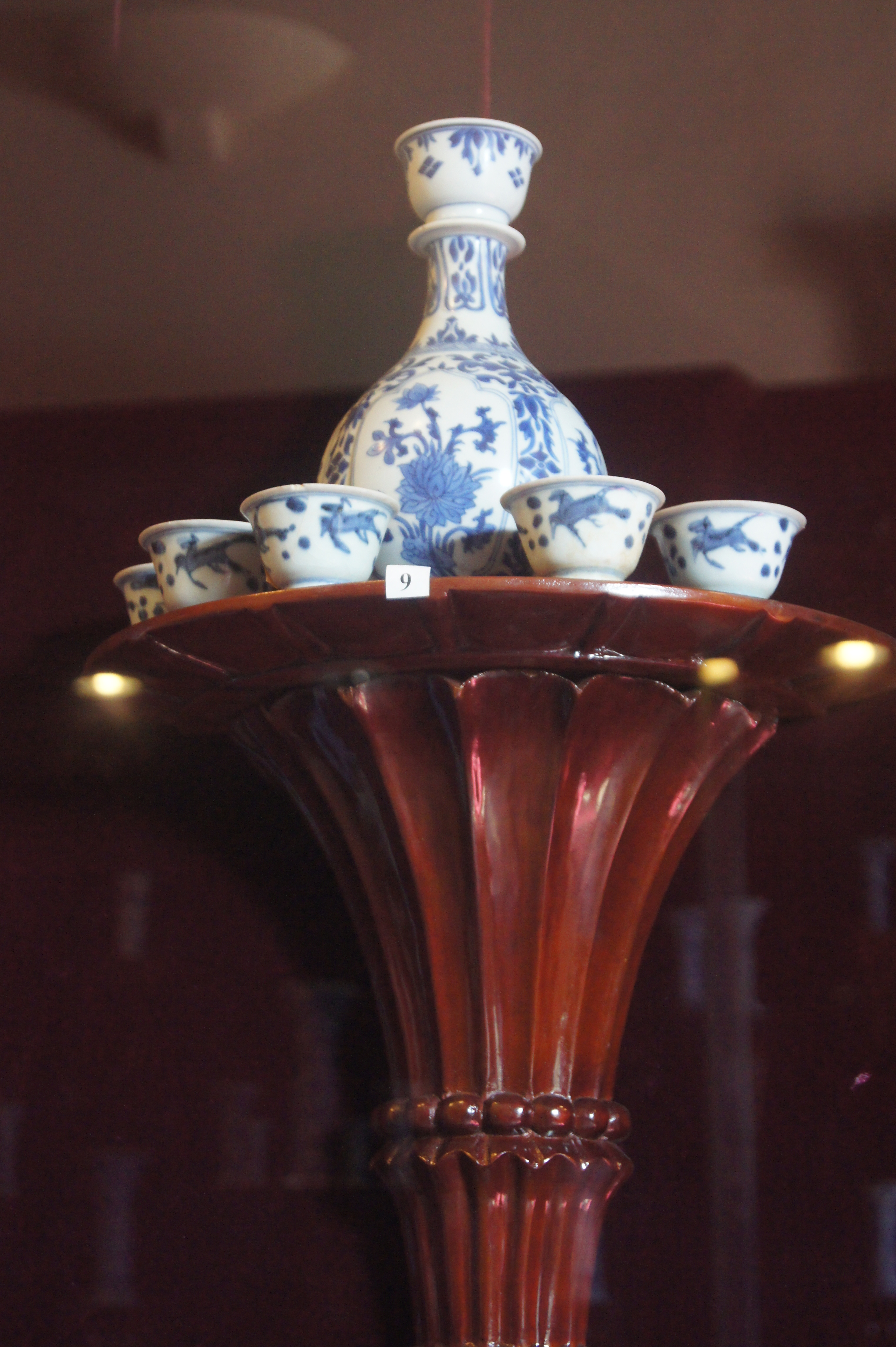 Đồ gốm trưng bày trong Bạch Dinh